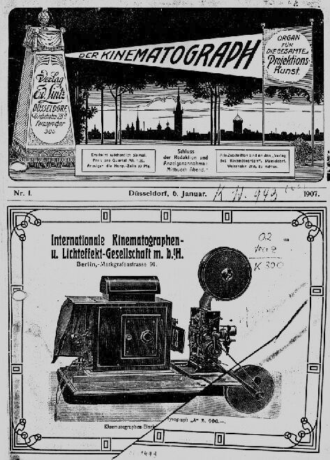 Titelbild "Der Kinematograph" erste Ausgabe 1907